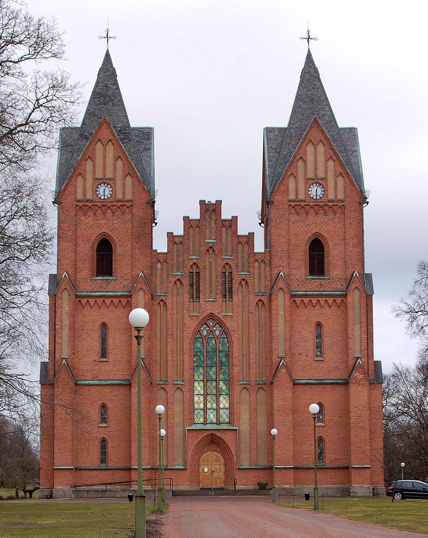 Kristinehamns kyrka.